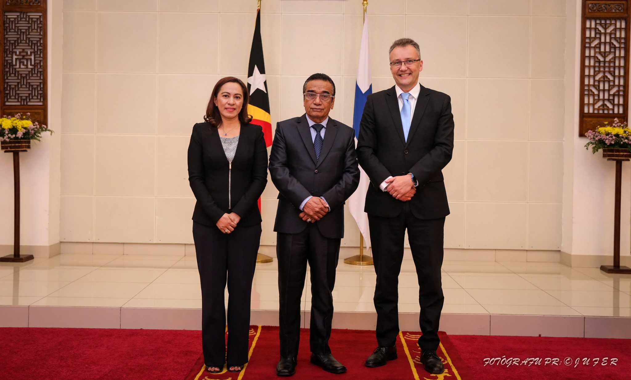 Präsident Francisco Guterres nimmt die Akkreditierung der neuen Botschafter in Osttimor entgegen: Finnland: Jari Sinkari Vereinigtes Königreich: Owen John Jenkins Polen: Beata Stoczynski Tetun: Prezidente Repúblika Francisco Guterres Lú Olo, ohin, simu karta kredensiál husi Embaixadór Finlandia, Jari Sinkari, Embaixadór Reinu Unidu, Owen John Jenkins, no Embaixadora Polónia, Beata Stoczynski atu hametin liután kooperasaun no amizade ho Timor-Leste.